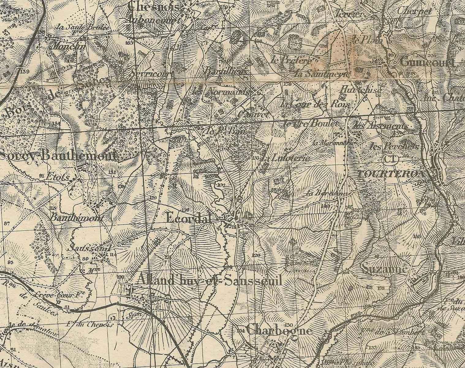 Alentours du village d'Ecordal (Ardennes, France) en 1935 - Extrait de la carte de l'Exercice des divisions motorisées de 1935 du Service géographique de l'Armée, France